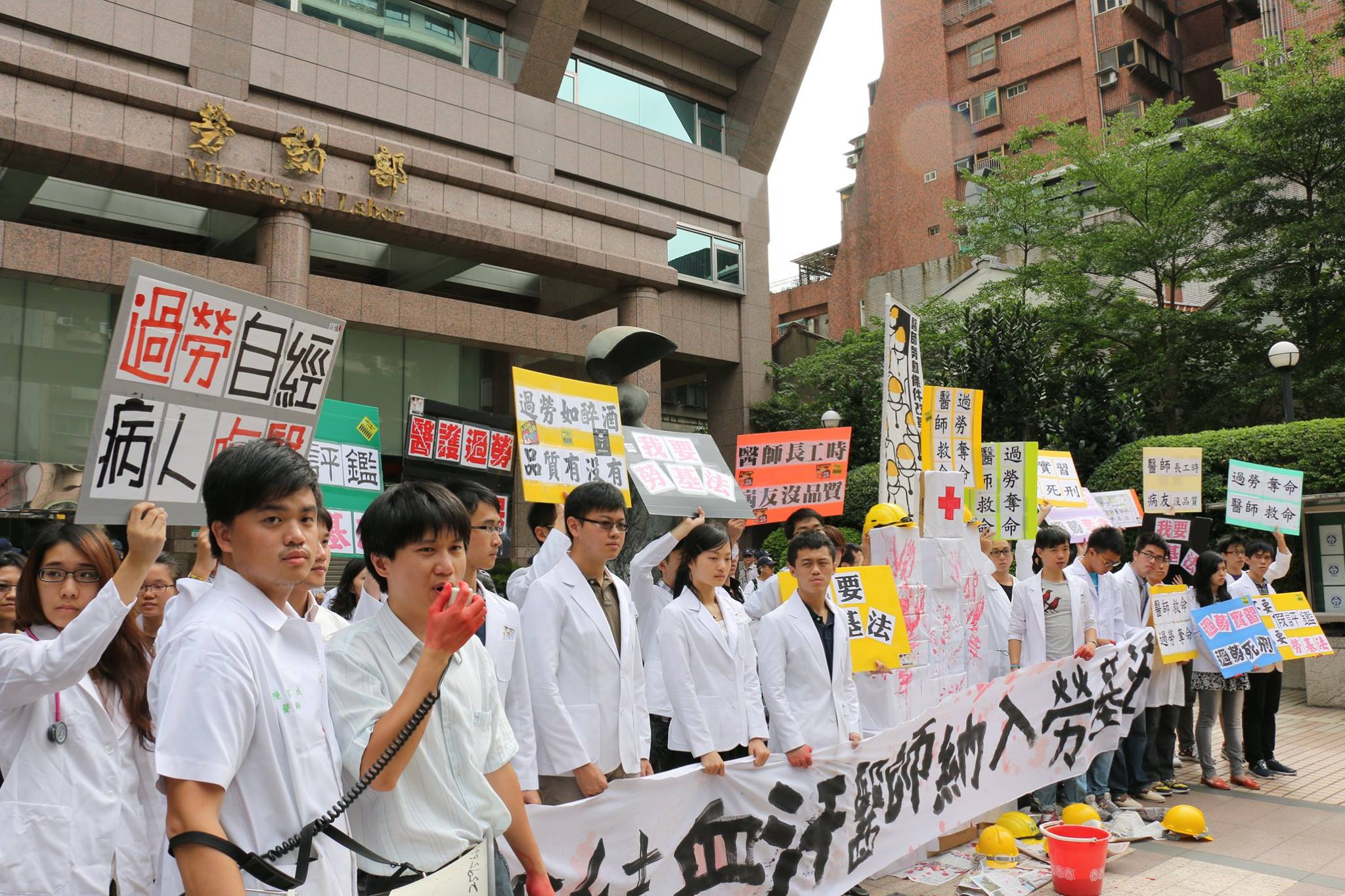 醫師勞動條件改革小組「醫師過勞，血染白袍」抗議行動，於勞動部大門前要求正視醫師過勞現況。